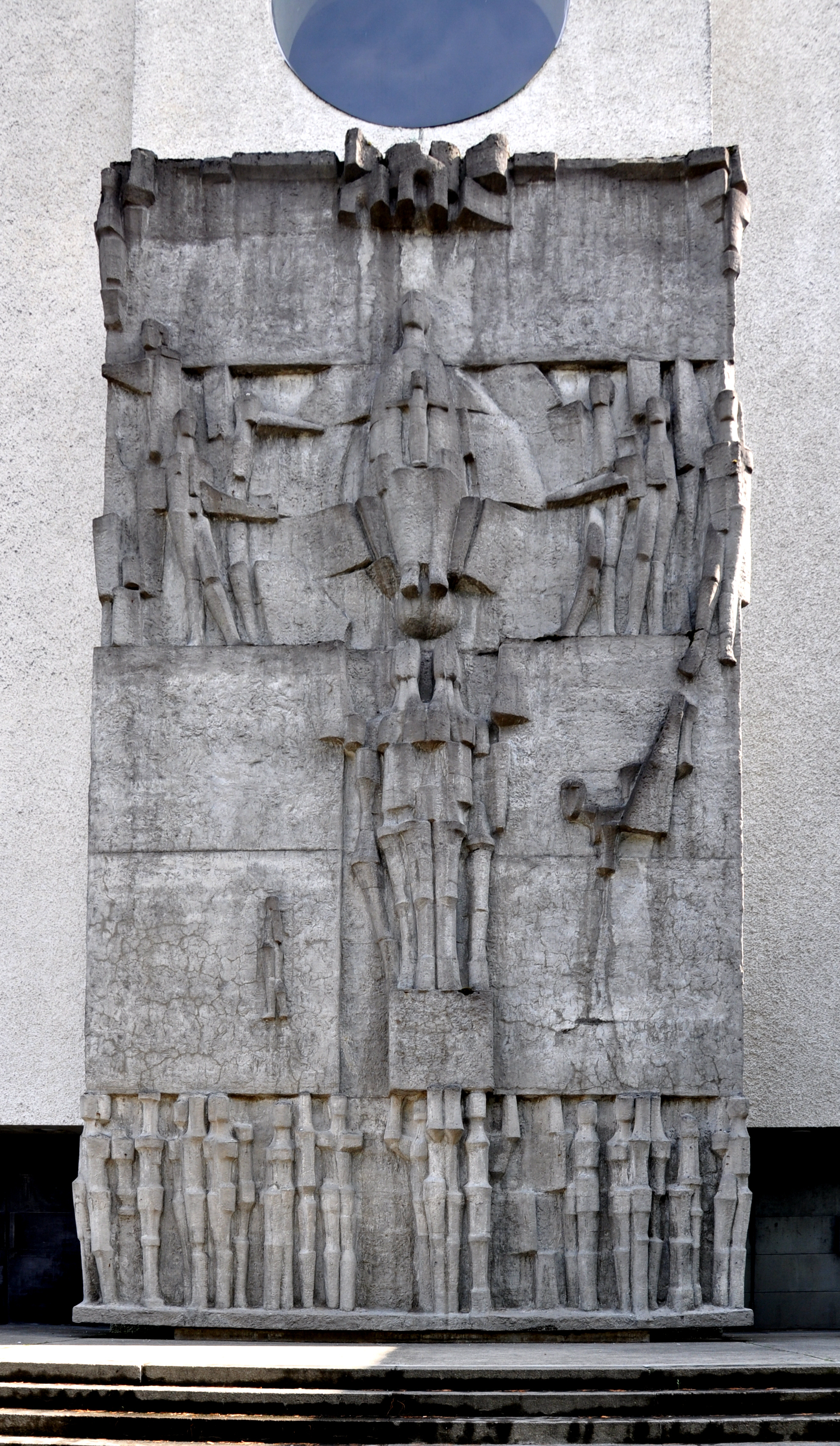 Kloster Mehrerau, Bregenz, Vorarlberg; Klosterkirche